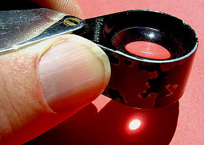 Lupe als Brennglas